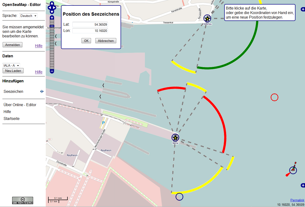 Online-Editor von OpenSeaMap